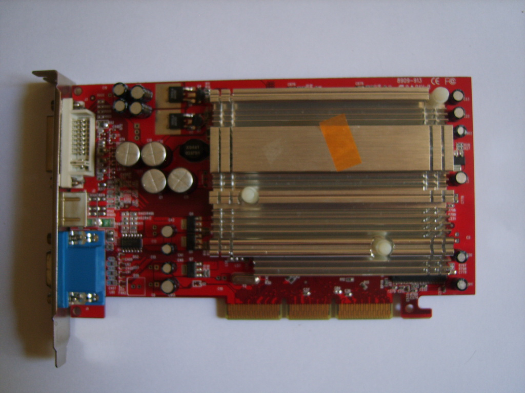 ATI Radeon 9600 128MB DDR DVI TV videókártya